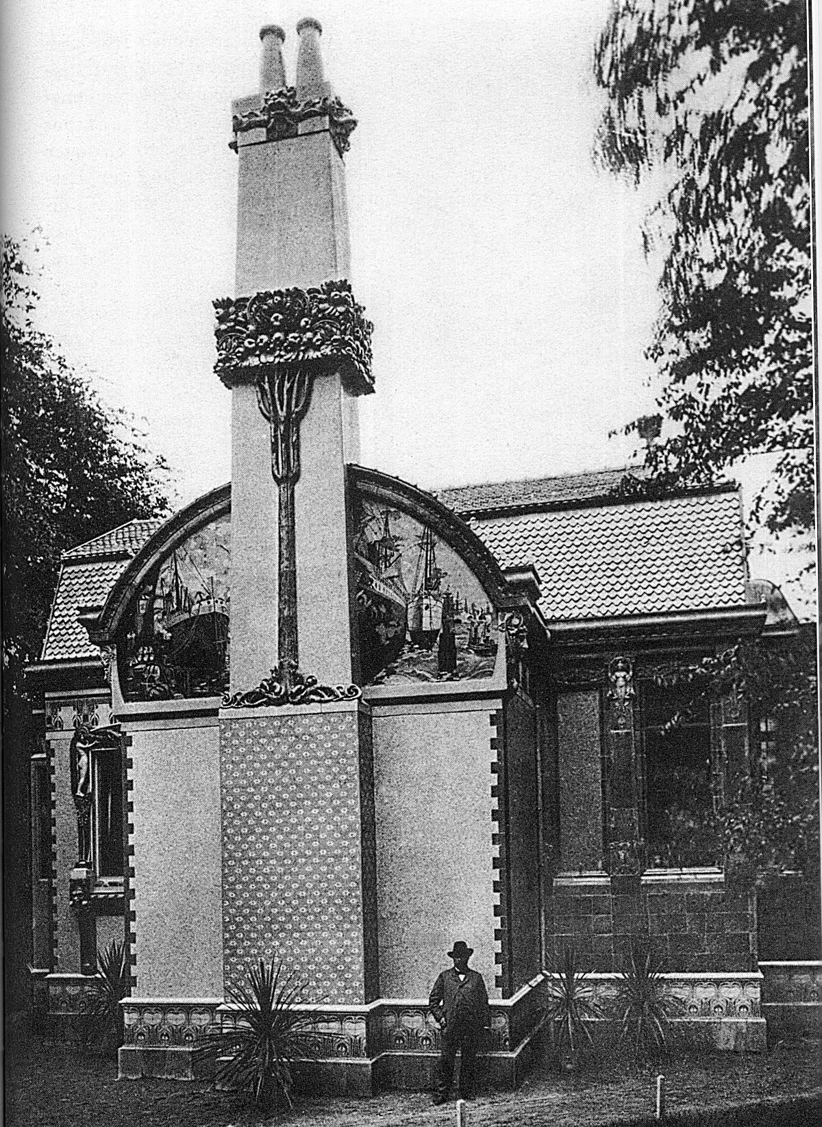 Düsseldorf, Majolikahäuschen von Villeroy & Boch im Düsseldorfer Hofgarten, erbaut nach Entwürfen von Anton Joseph Pleyer im Jahre 1902, abgebrochen 1926, 1.jpg